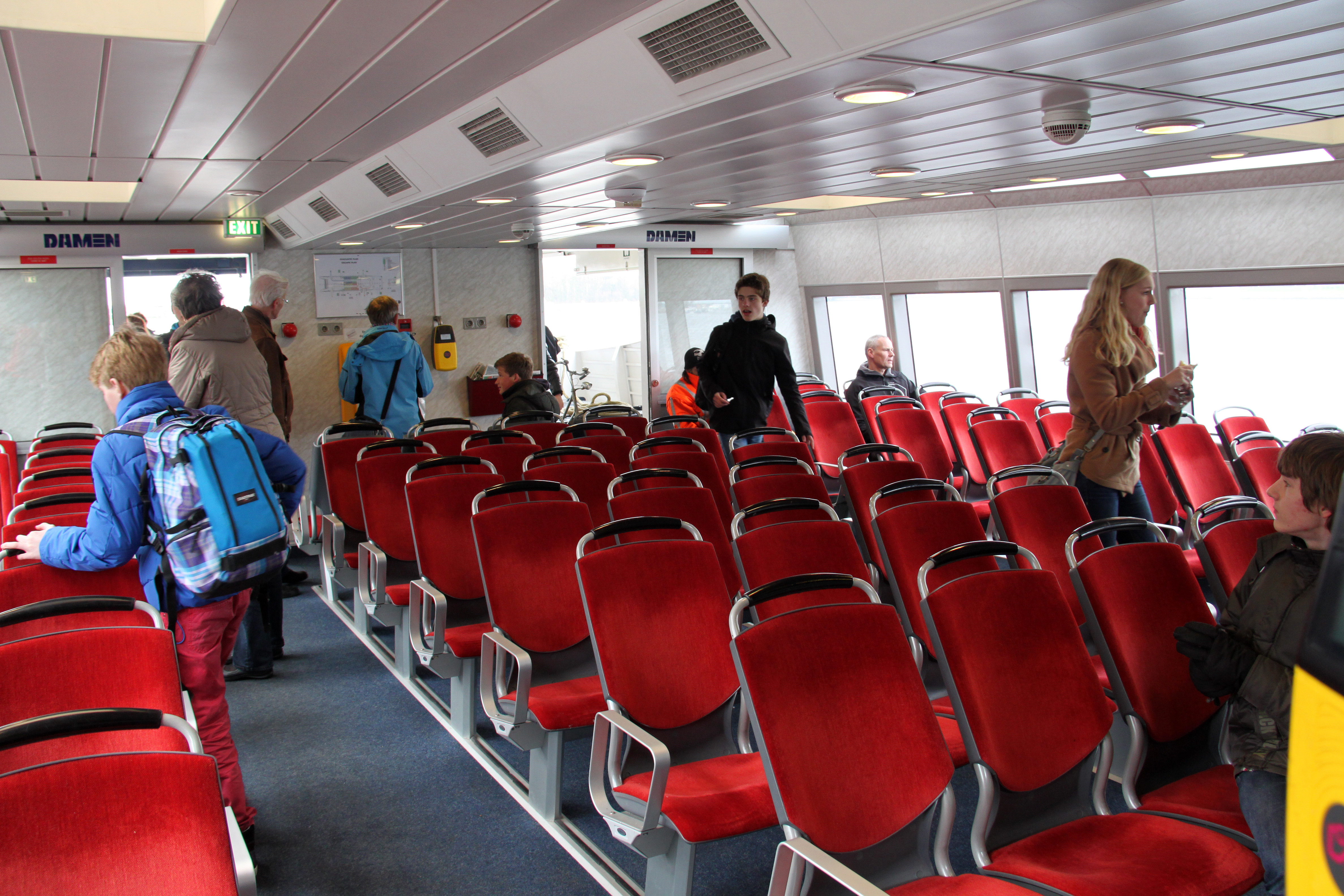 Interieur van Waterbus Schie.